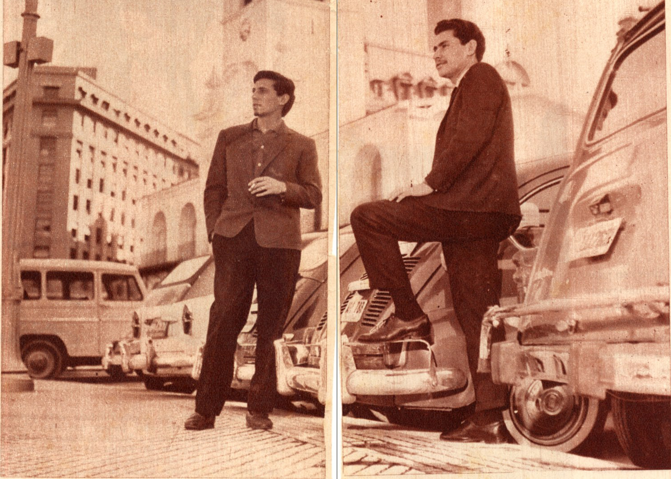 Foto de Los Olimareños publicada en 1965 en la revista Folklore de Buenos Aires